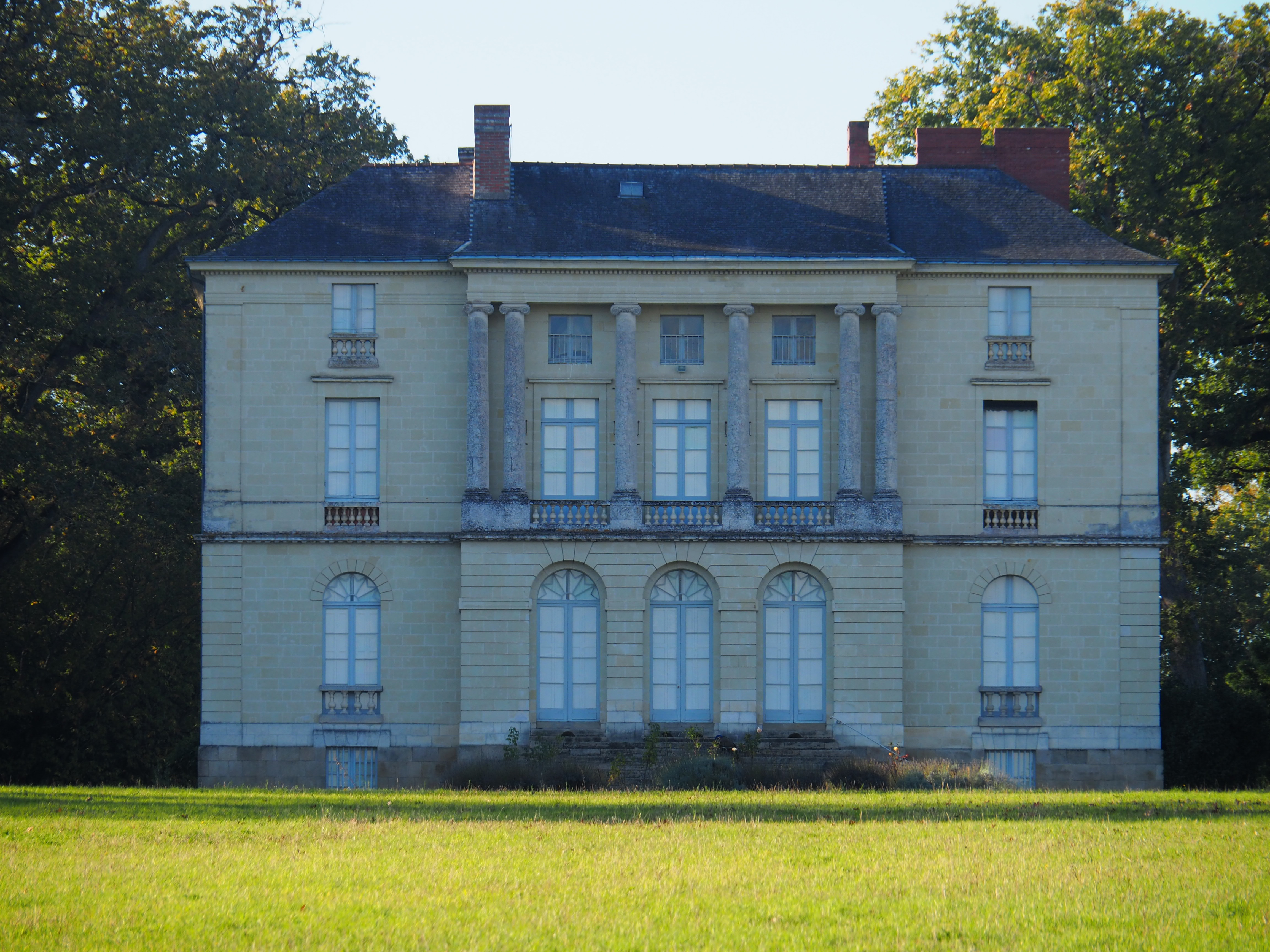 Photographie de la façade du château de Grandville